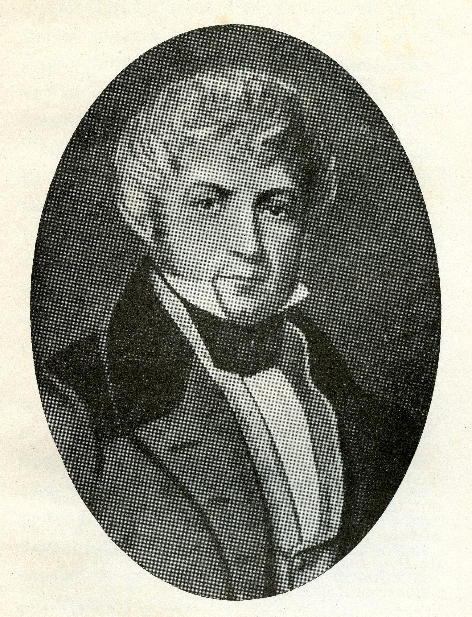 Peinture, portrait de Manuel Vicente del Popolo Rodriguez (Garcia)